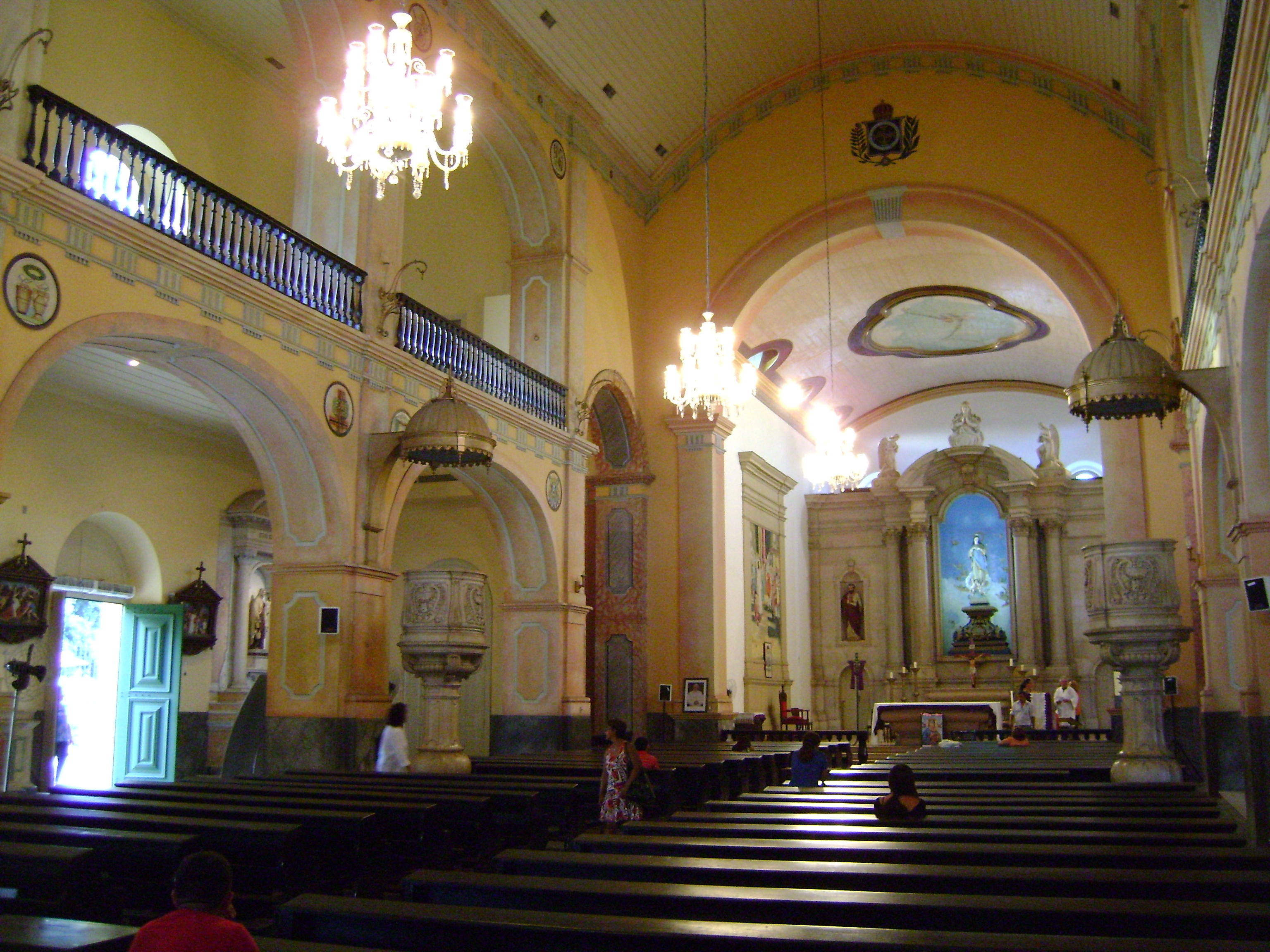 Catedral Metropolitana de Manaus, Amazonas, Brasil.